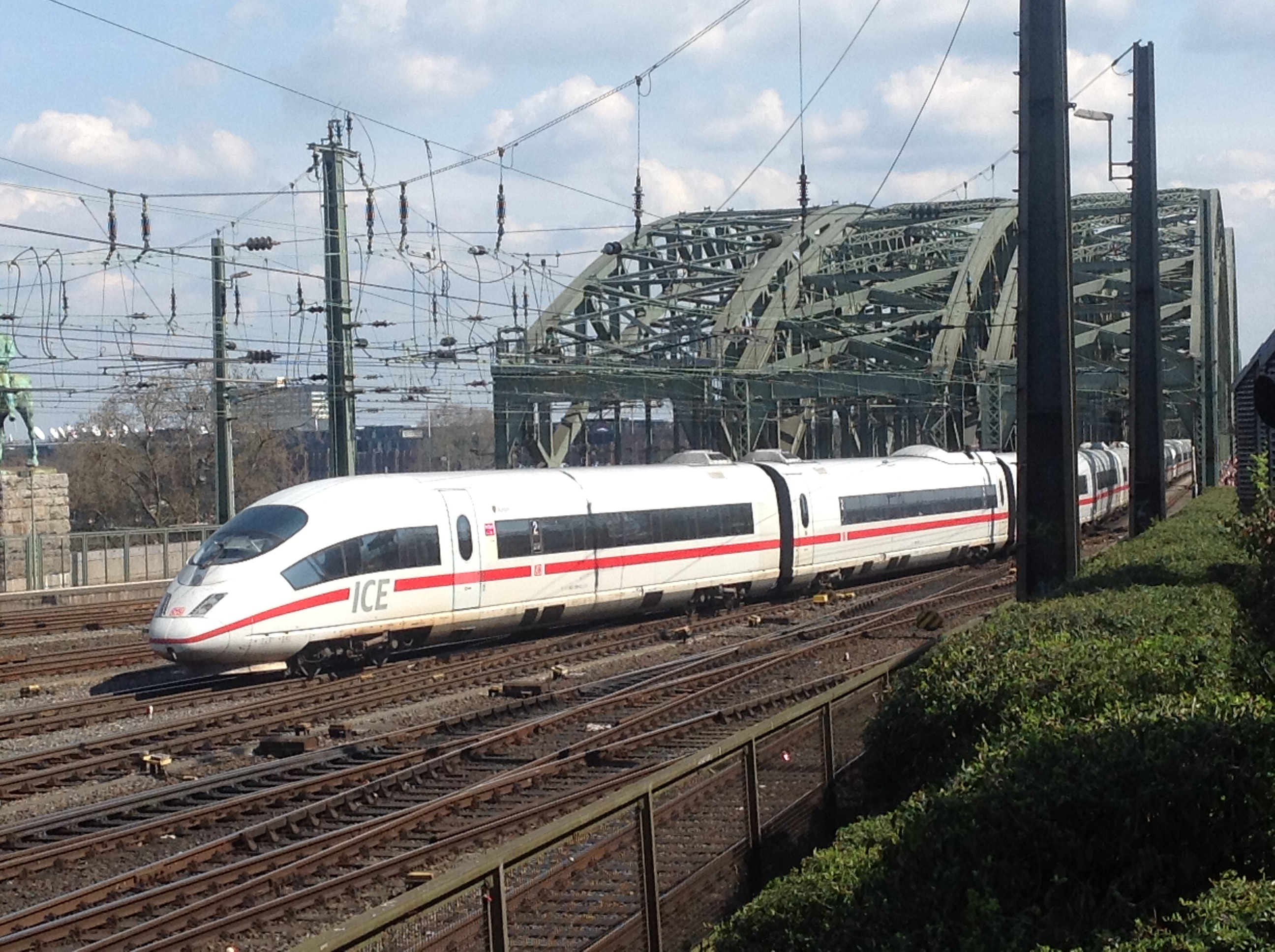 German Railways ICE 3 train at Cologne, Hohenzollern Bridge / Deutsche Bahn ICE 3 - Köln, Hohenzollernbrücke